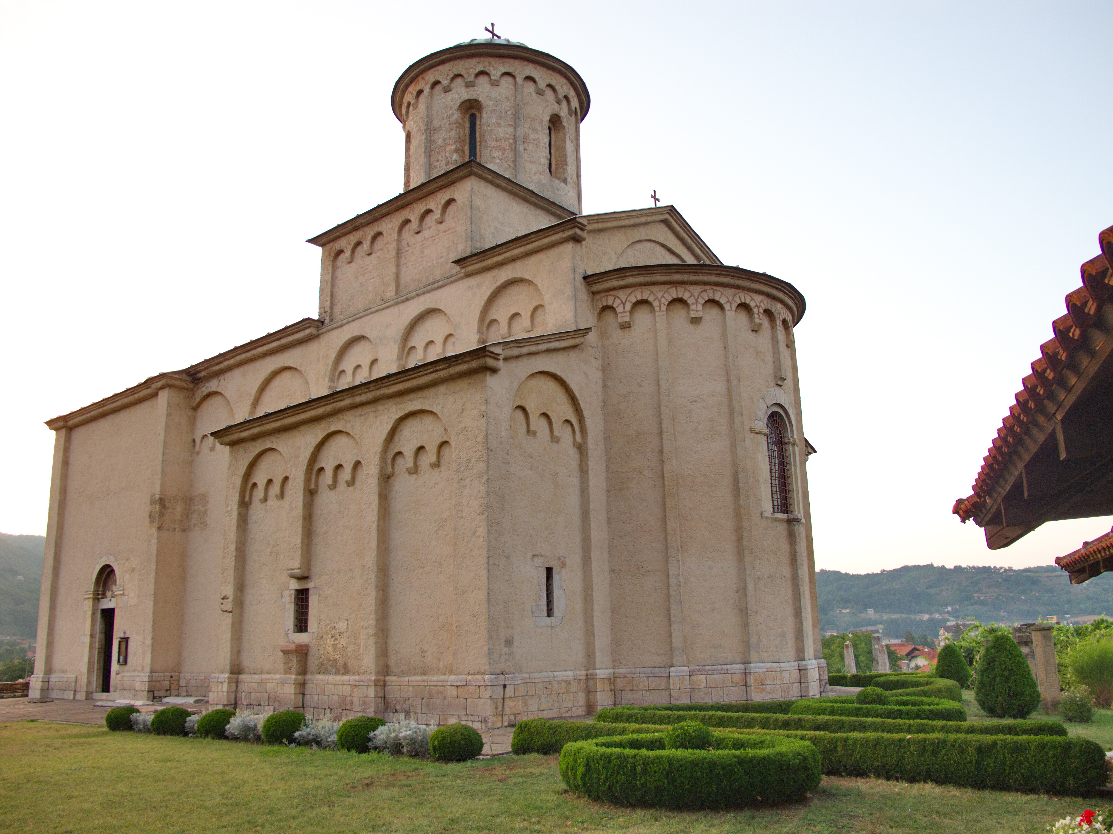 Црква светог Ахилија.